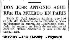 Jose Antonio Aguirre ha muerto en Paris - Paris 22 Jose Antonio Aguirre, que fué el jefe del Gobierno de la republica Vasca durante la guerra de Liberacion espanola, ha muerto en Paris de un ataque al corazon. Tenia cinquenta y seis anos de edad.